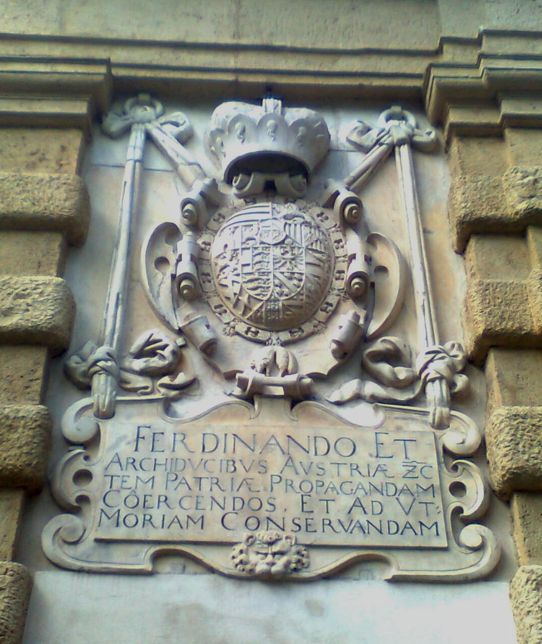 Paulustor, Graz, linkes Wappen Erzherzog Ferdinand II.